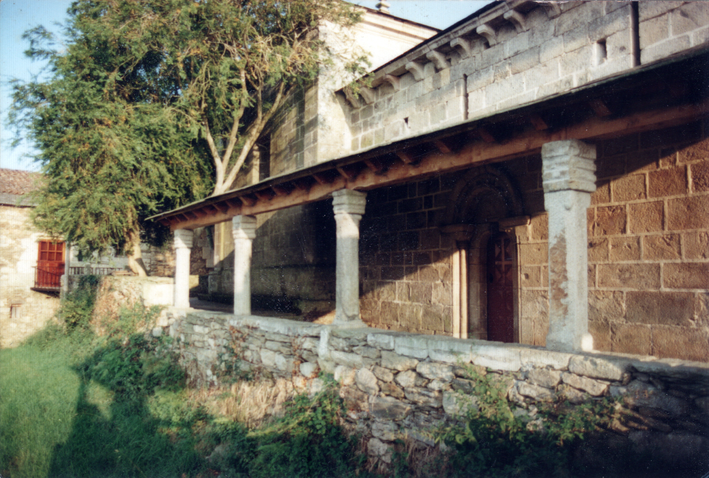 Iglesia de S. Xoán de Friolfe (O Páramo)